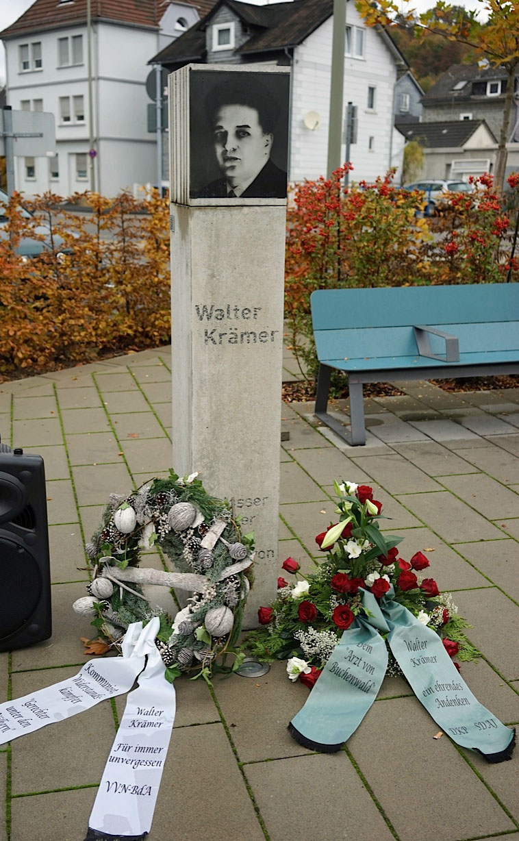 Porträt-Stele vor dem Kreisklinikum Siegen auf dem Walter-Krämer-Platz, benannt nach dem 1941 ermordeten antifaschistischen Widerstandskämpfer Walter Krämer (KPD)